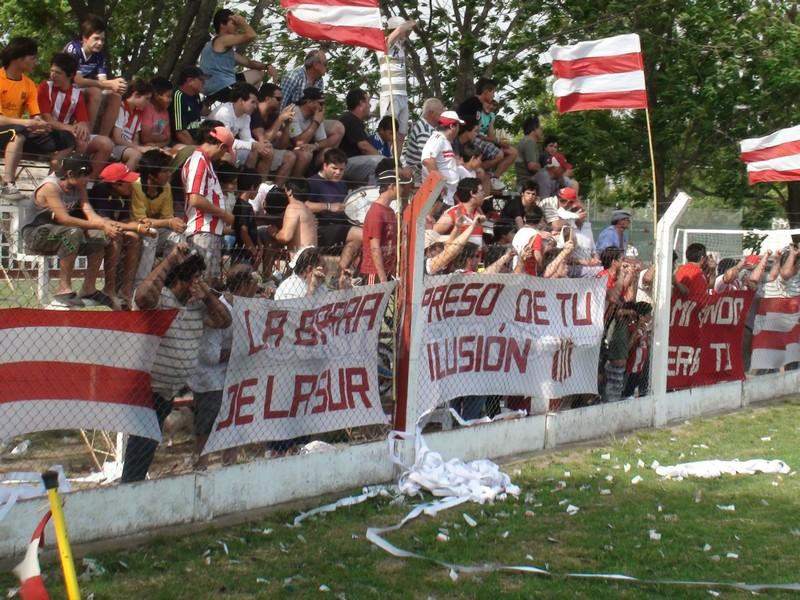 Hello